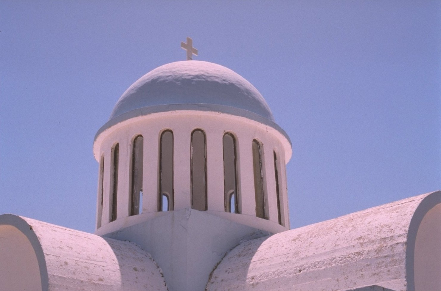 Kreta, Paleochora, Kapelle in den Bergen